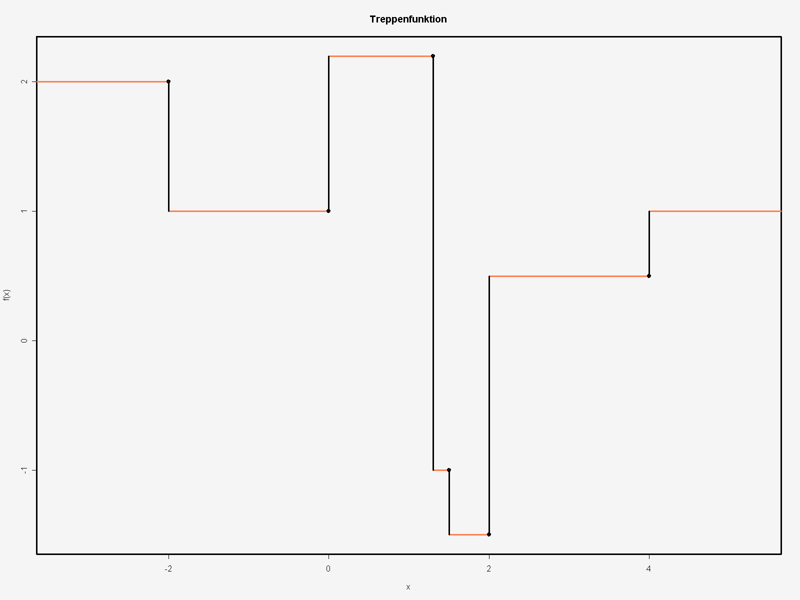 a simple stepfunction